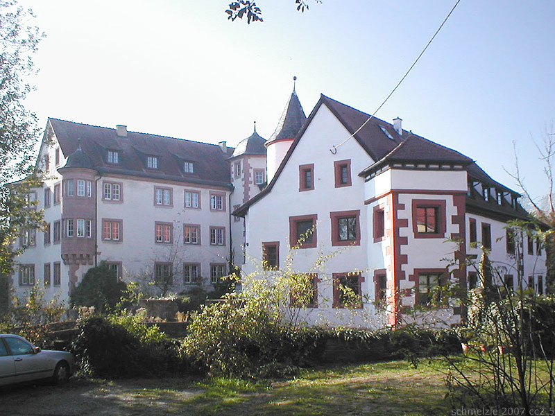 Hauptgebäude des Schlosses in Mosbach-Lohrbach, Baden-Württemberg, Deutschland